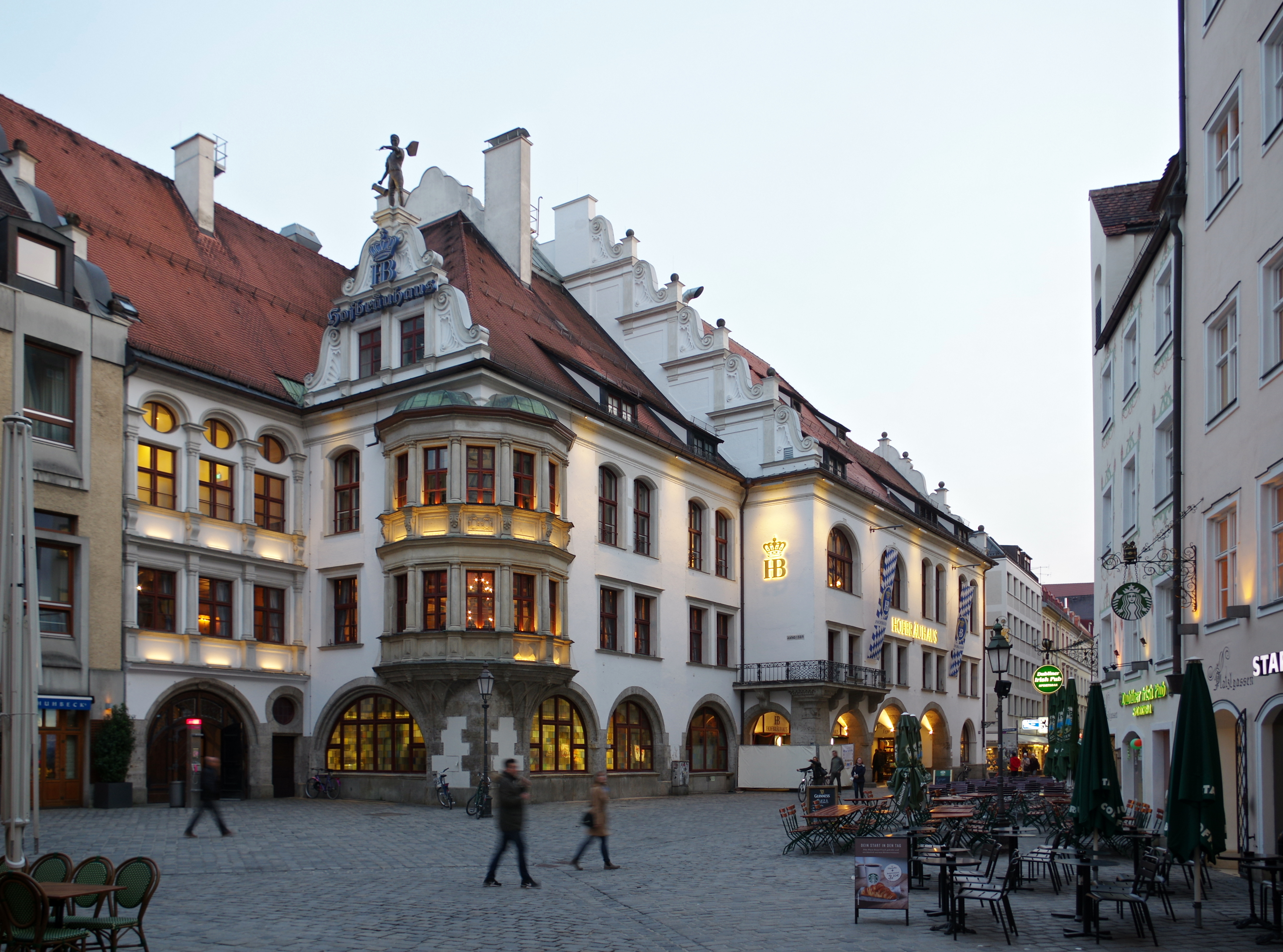 München, Platzl 9, Hofbräuhaus; Akten-Nr. D-1-62-000-5400